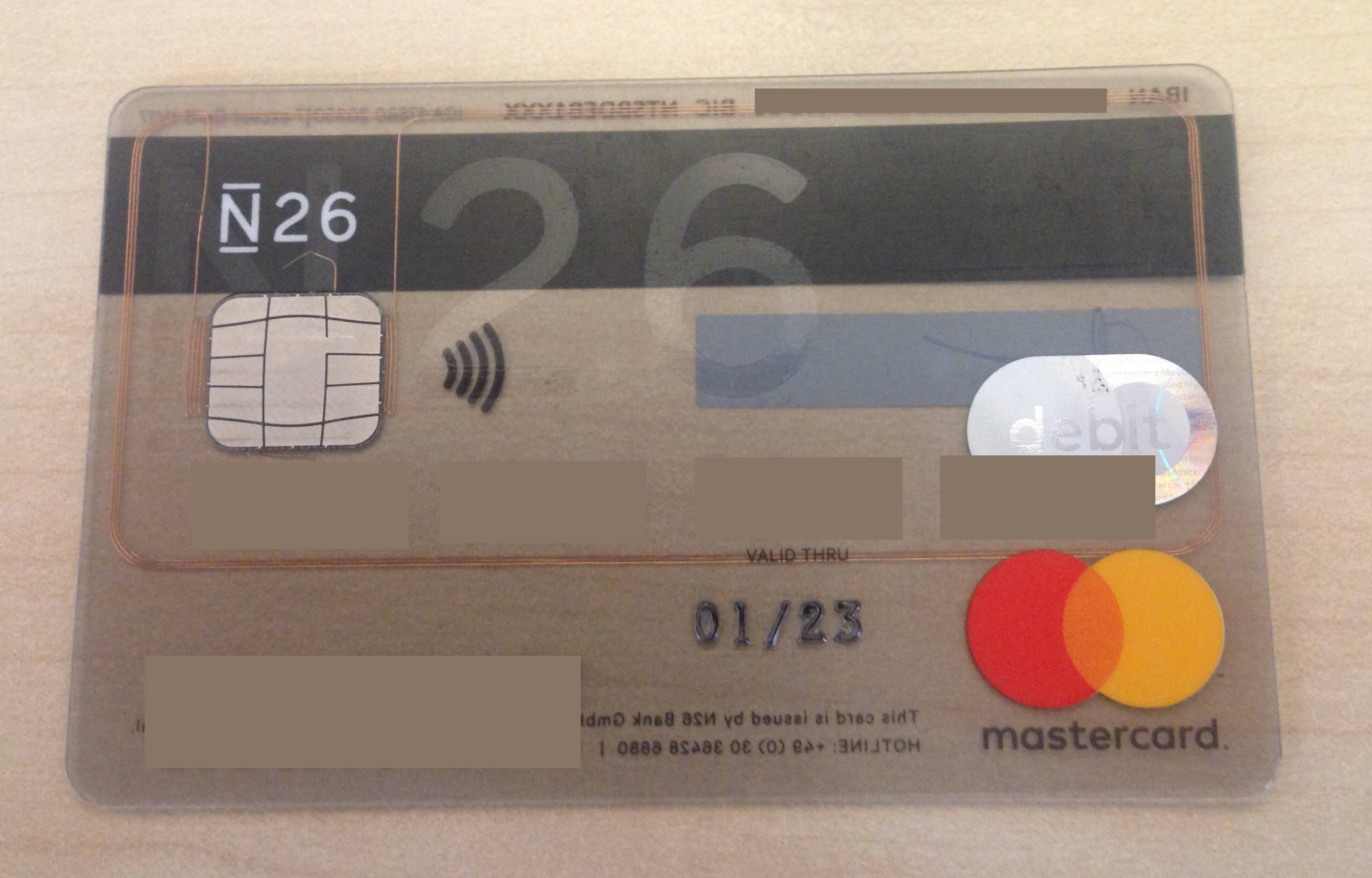 Photo de ma carte N26 (modèle le plus basique) avec les informations sensibles cachées.